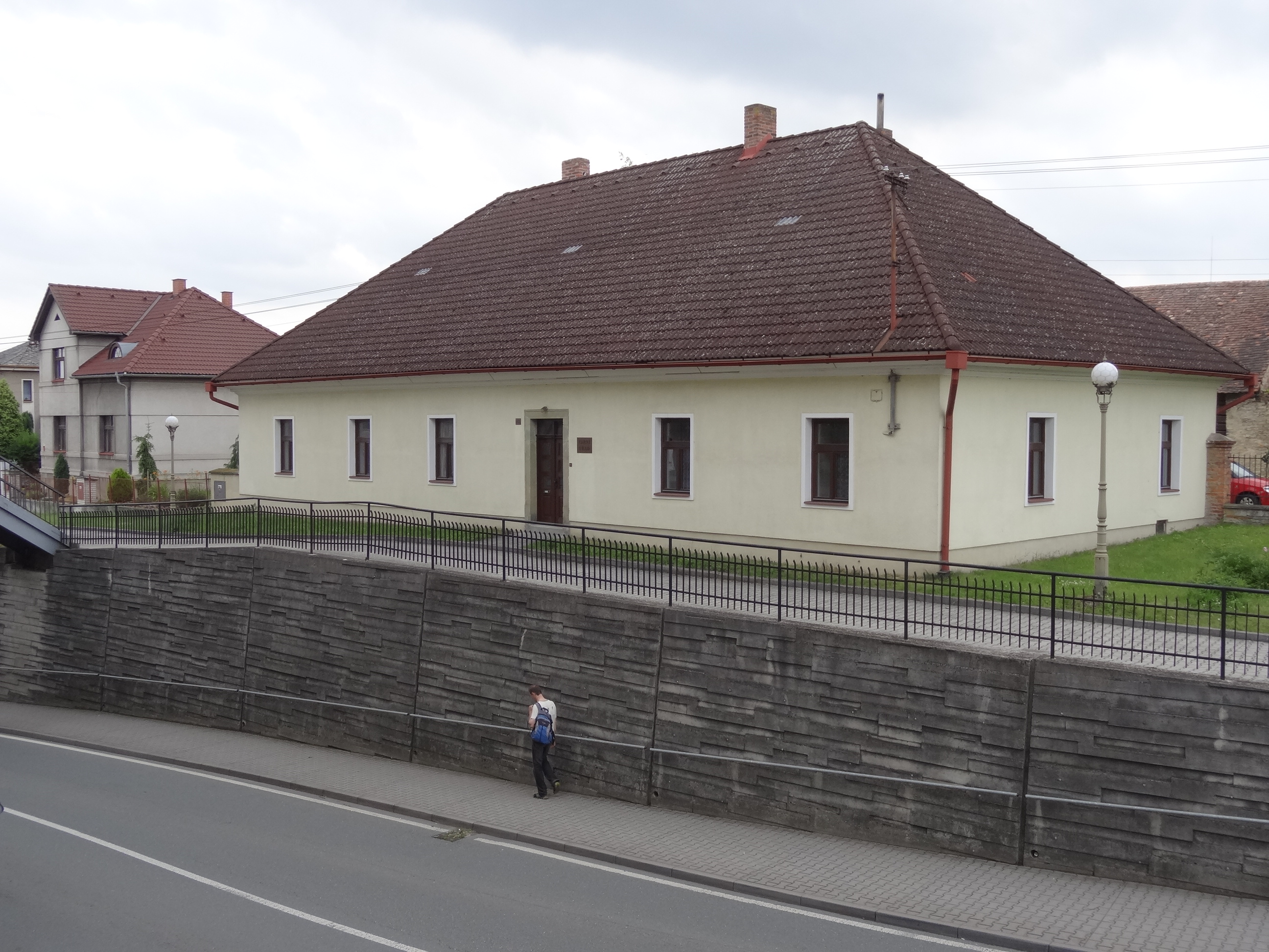 Kostel svatého Víta s farou, Častolovice.